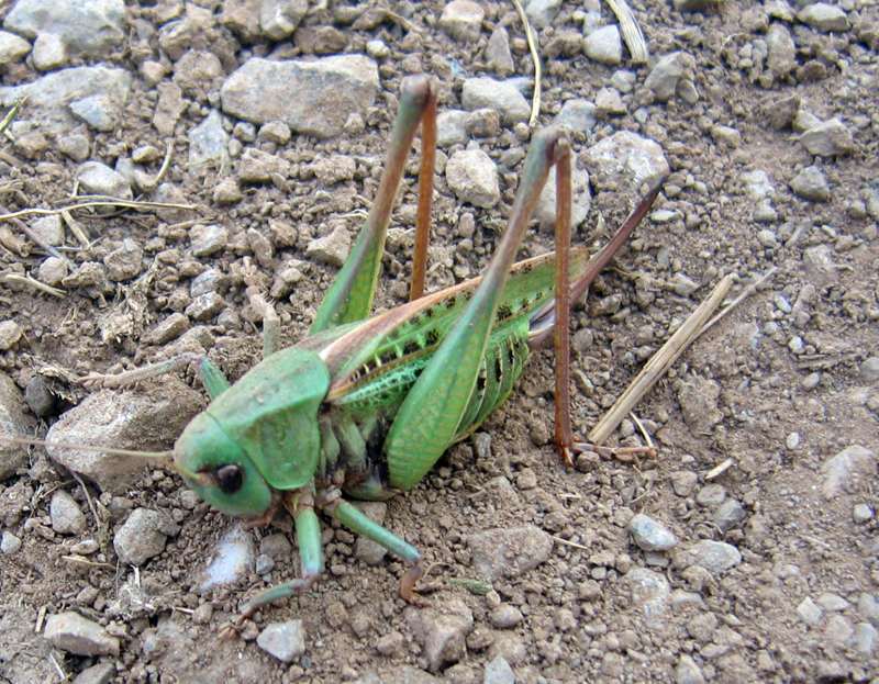 Skakavac na putu u Biogradskoj gori, Decticus verrucivorus